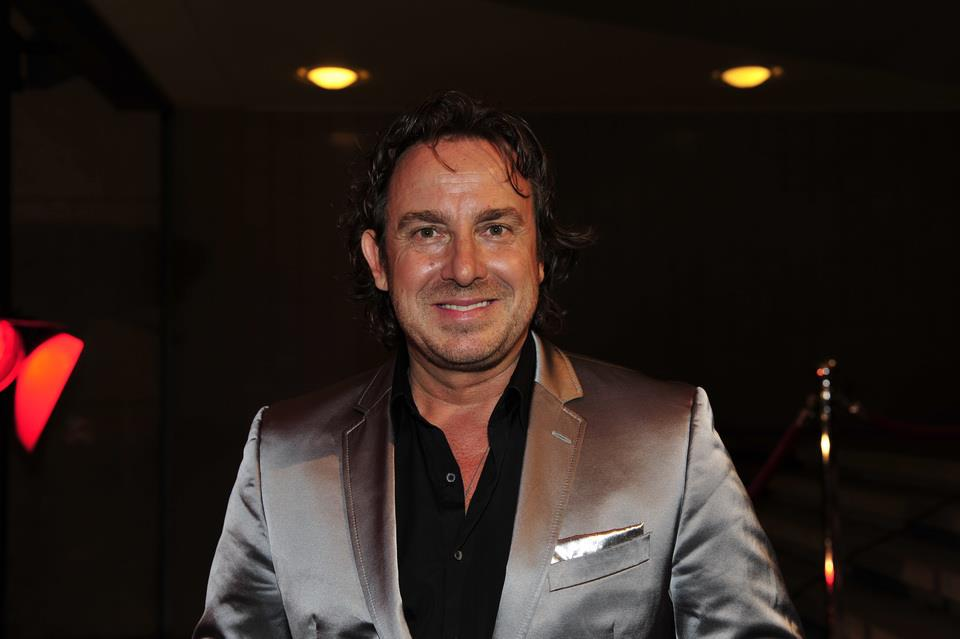 Marco Borsato all' Edison Pop 2011